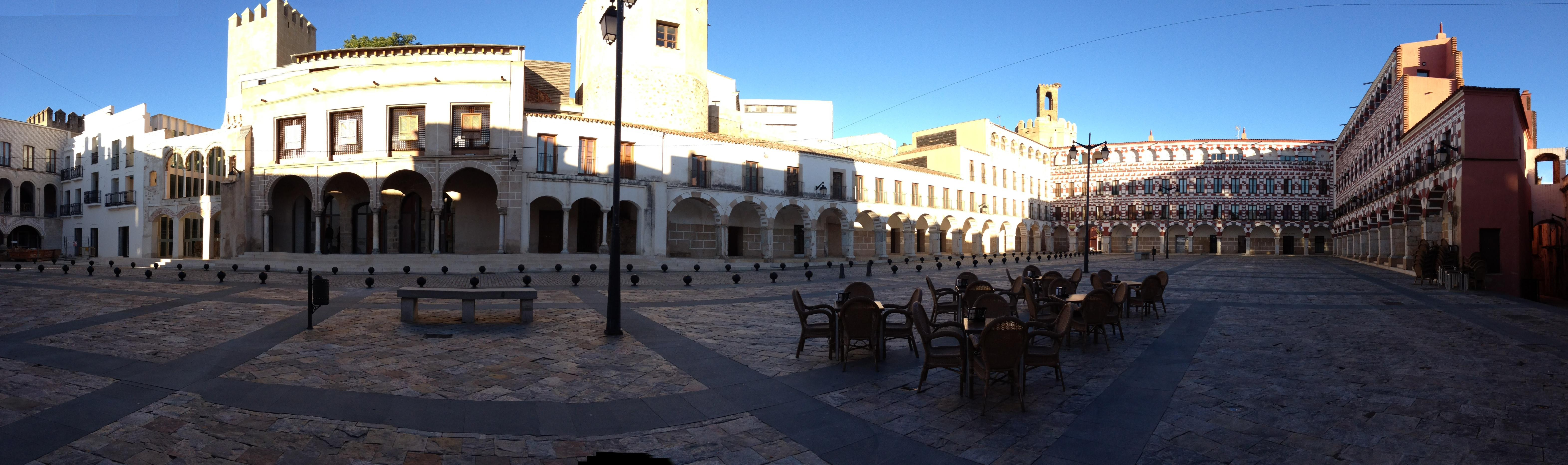 Vista panorámica de la Plaza Alta de Badajoz